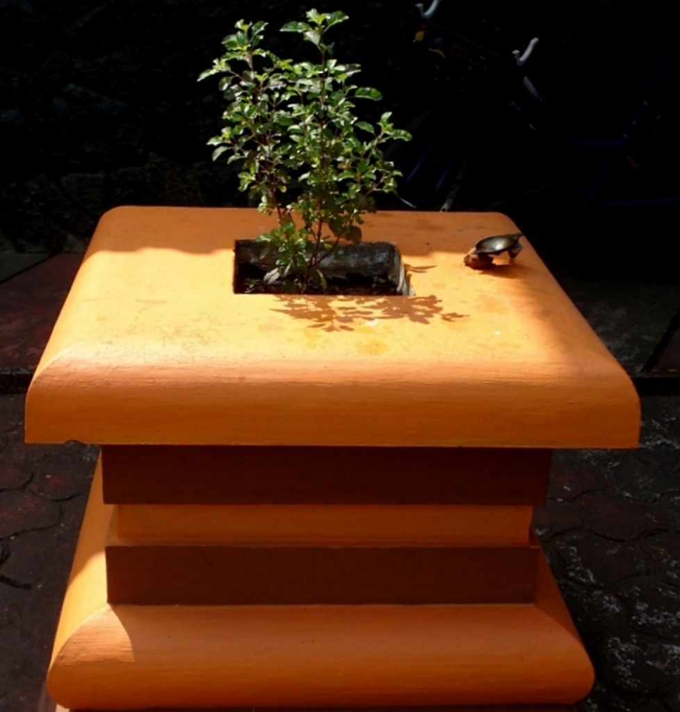 തുളസി-തറ